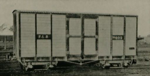 Materiel roulant des Fayoum Light Rys Co - FLR No 602